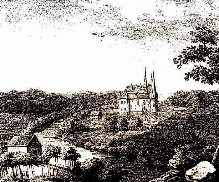 Haus Waterlappe-Fürstenberg (Zustand vor 1680), Kupferstich des 19. Jahrhunderts